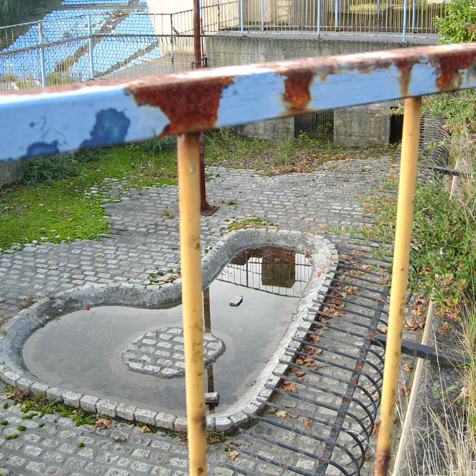 Estanque Mini-Zoo Parque de Atracciones de Vizcaya